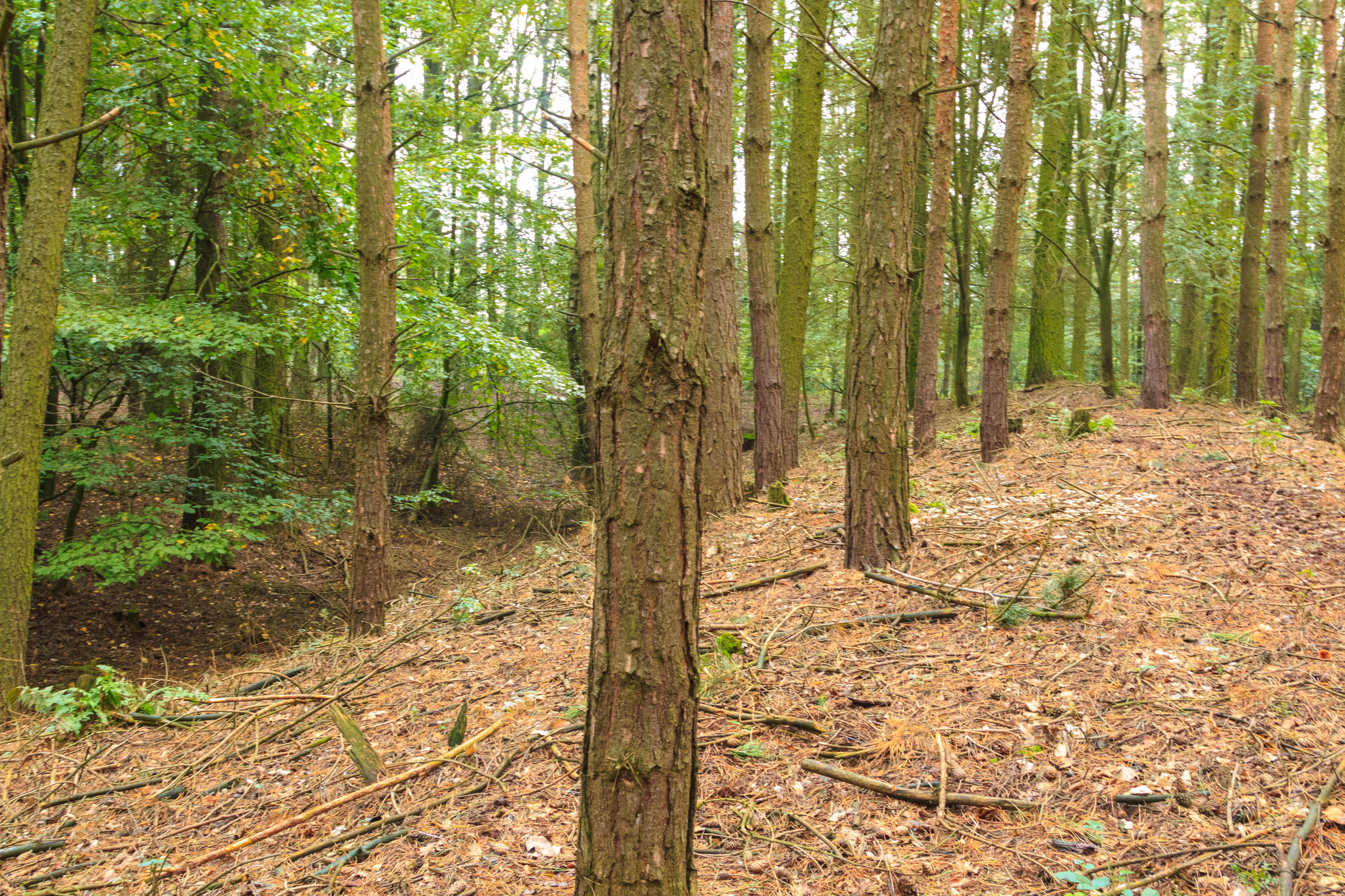 Slovanské hradiště Na valech, Horní Přím - les jižně od vsi, zčásti parcely 75, 76, 77, celá parcela 85/2, Horní Přím.